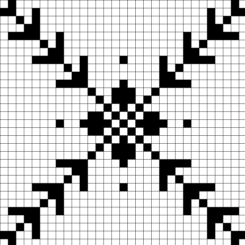 Motif tricot norvégien, skartrell